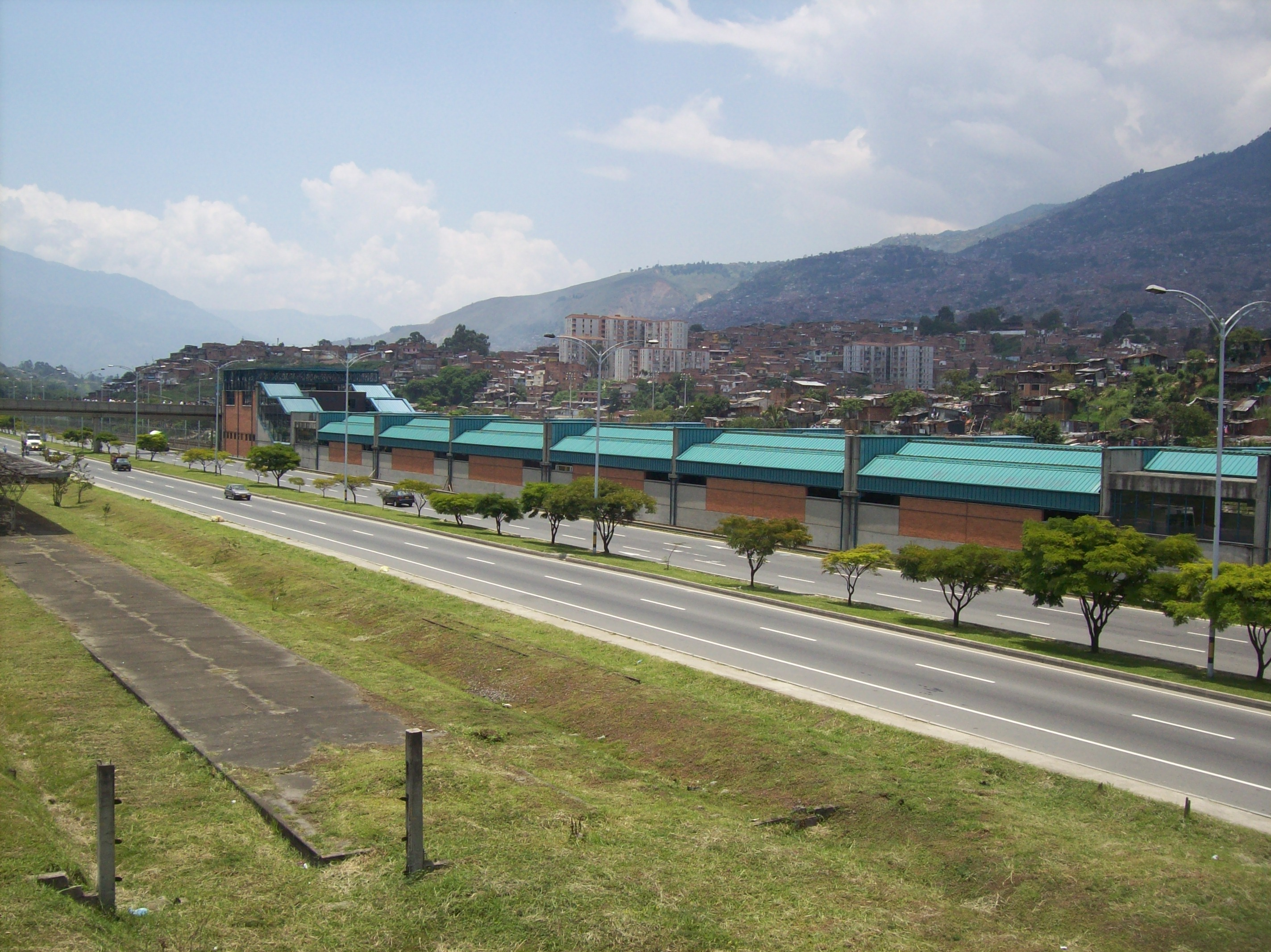 Aspecto externo de la Estación Caribe del Metro de Medellín desde la salida occidental del acceso sur. Tras la estación se encuentran el Río Medellín y Aranjuez (visible). En la parte inferior izquierda se aprecian las ruinas del Ferrocarril de Antioquia; y en la parte derecha, la fachada de la Iglesia de Nuestra Señora del Consuelo (de espadaña blanca con una cruz pintada.